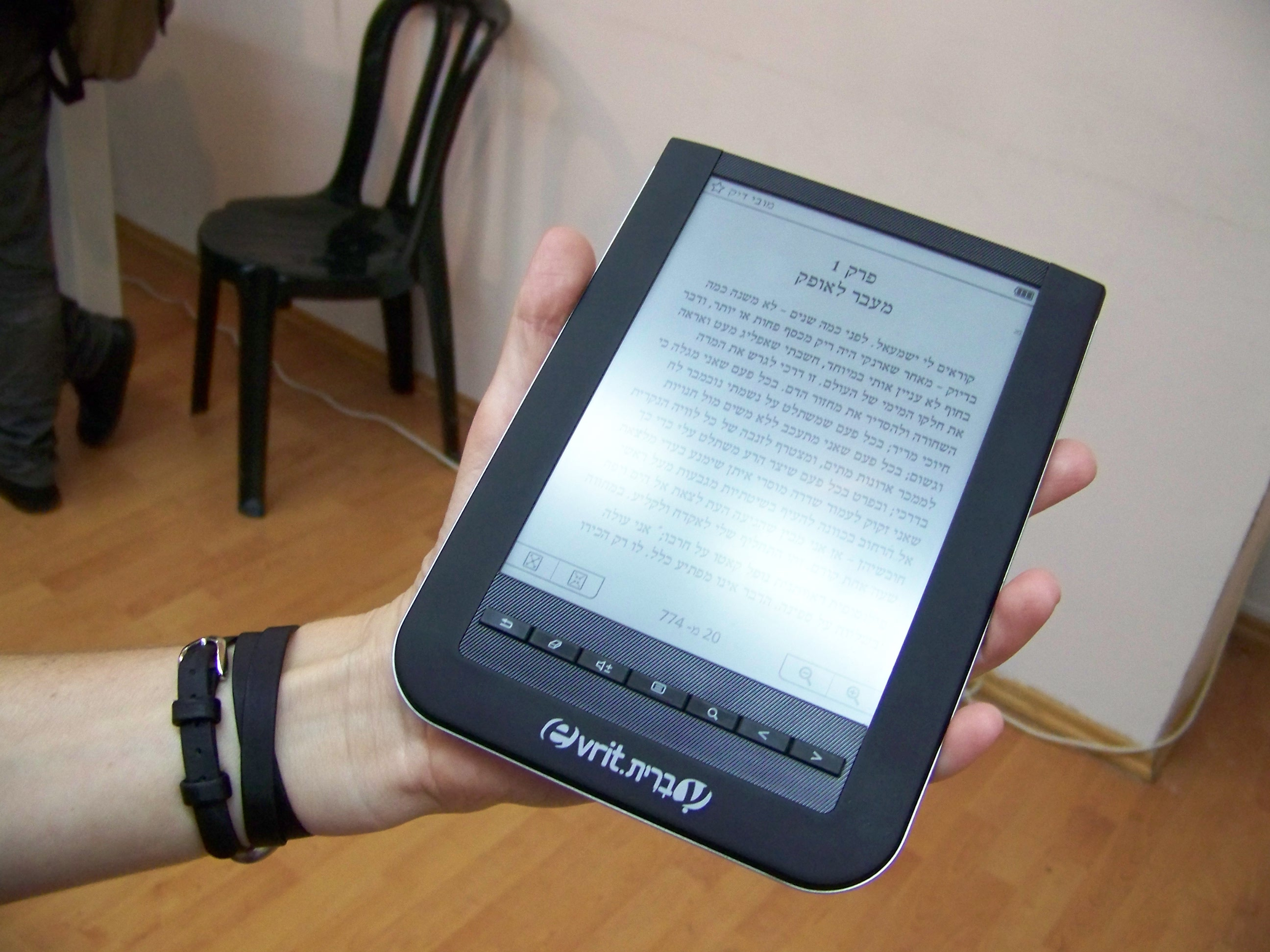 השקת "עברית", הקורא האלקטרוני של ידיעות טכנולוגיות, ניופאן וסטימצקי, ב"בית ביאליק" בתל אביב, 26.5.2010. צילום: עידו קינן, חדר 404 (cc-by-sa)